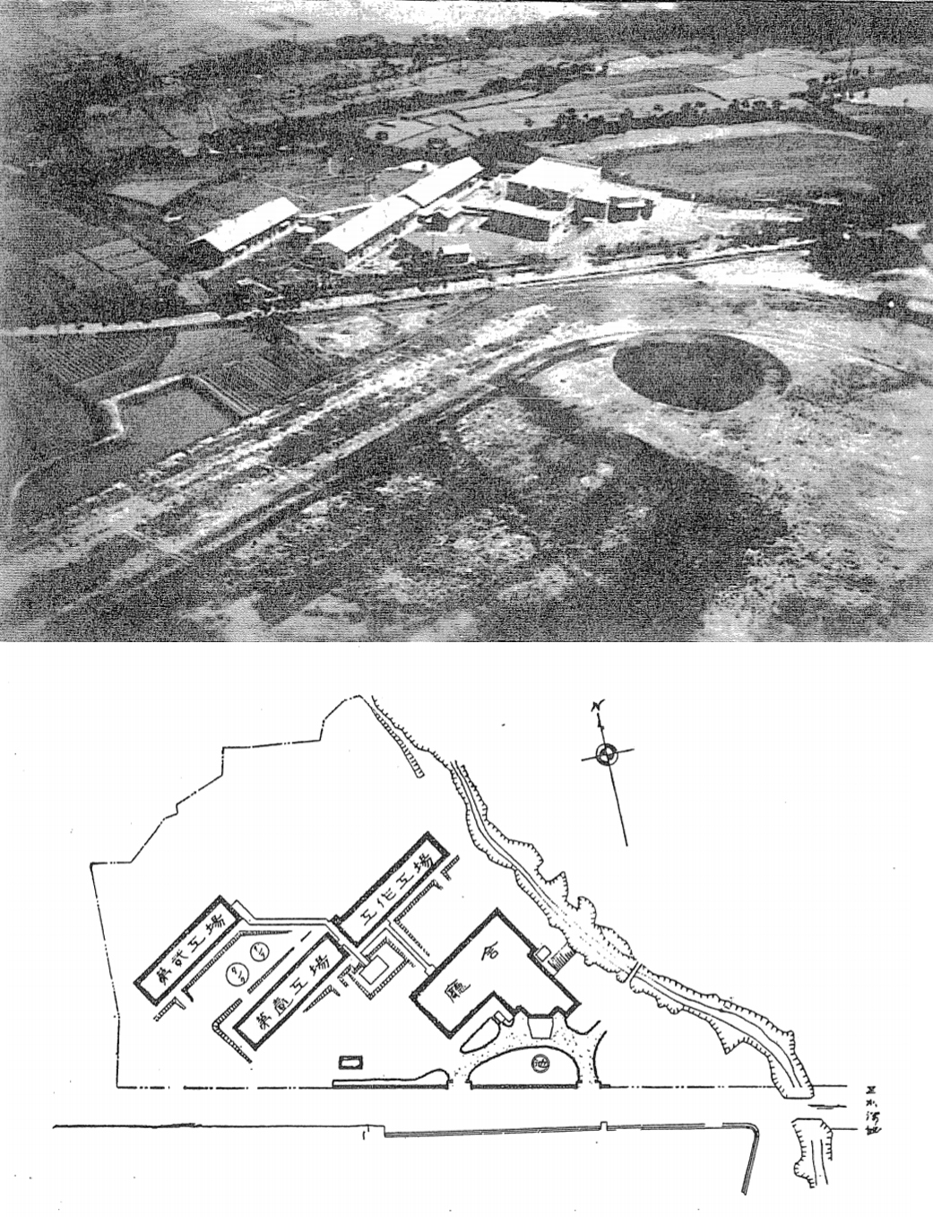 中文（台灣）: 天然瓦斯研究所南側道路為現今的新竹市博愛街